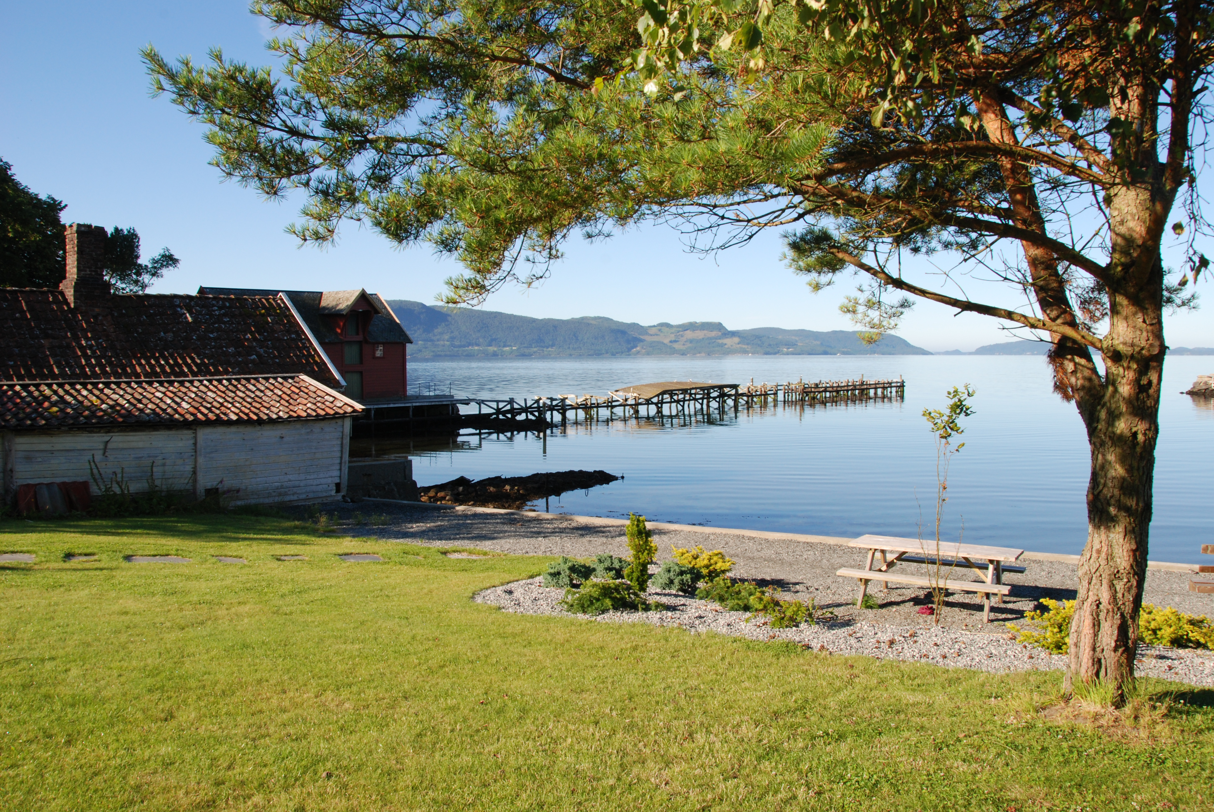 Bildet viser restene av `Jelsakaien` som stormen Inga ødela